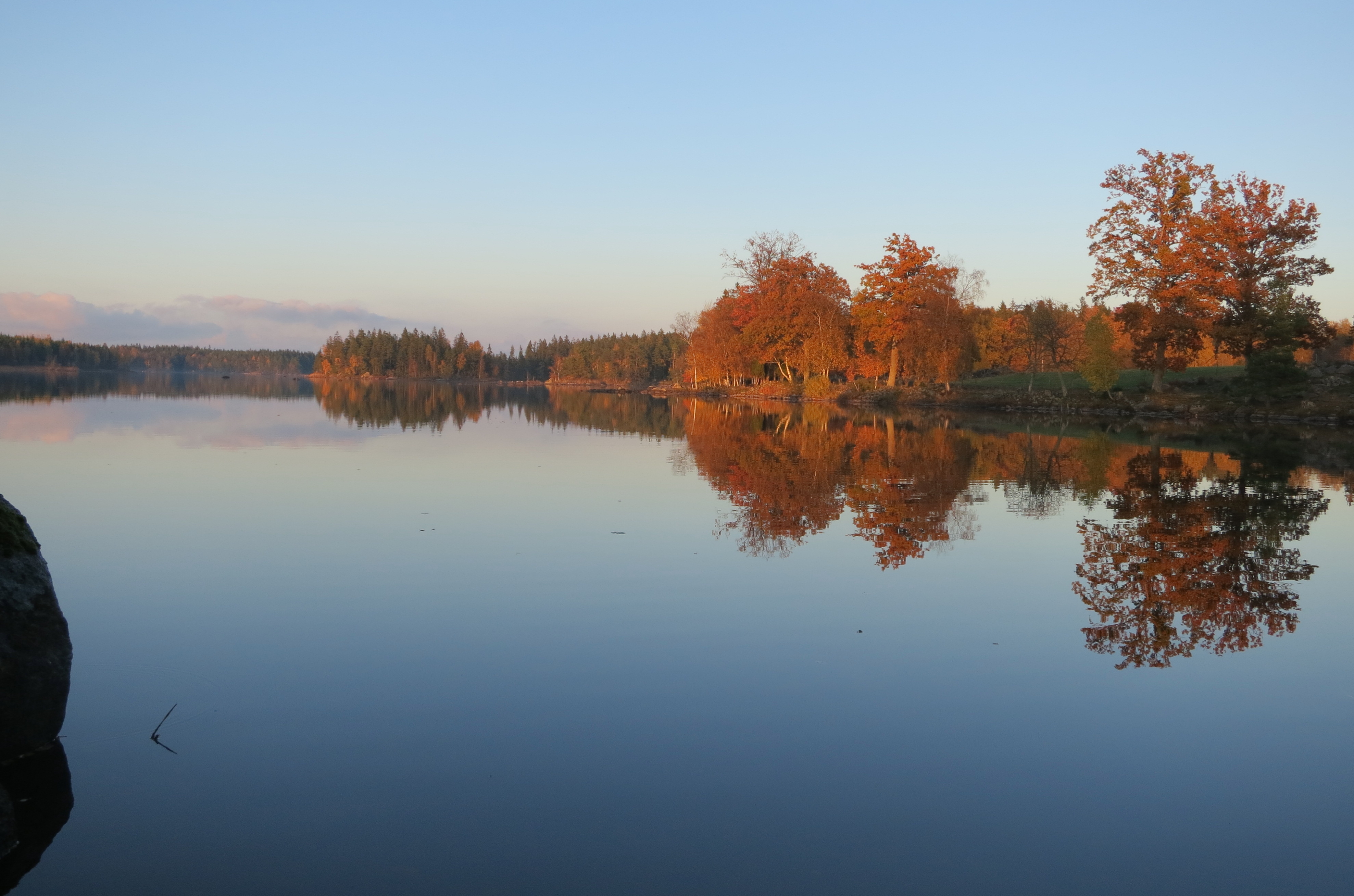 Sjön Kinnen, Tingsryds kommun